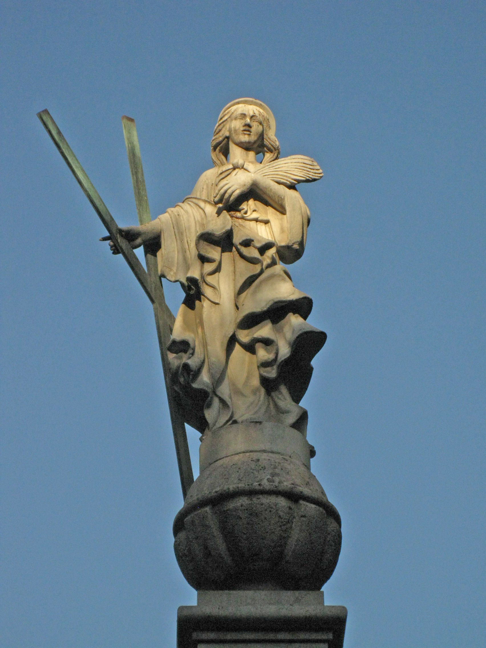 Font de Santa Eulàlia, a la plaça del Pedró, al Raval de Barcelona. Construïda el 1687, la santa que la corona fou destruïda durant la Guerra Civil i substituïda per una estàtua de Frederic Marès el 1952